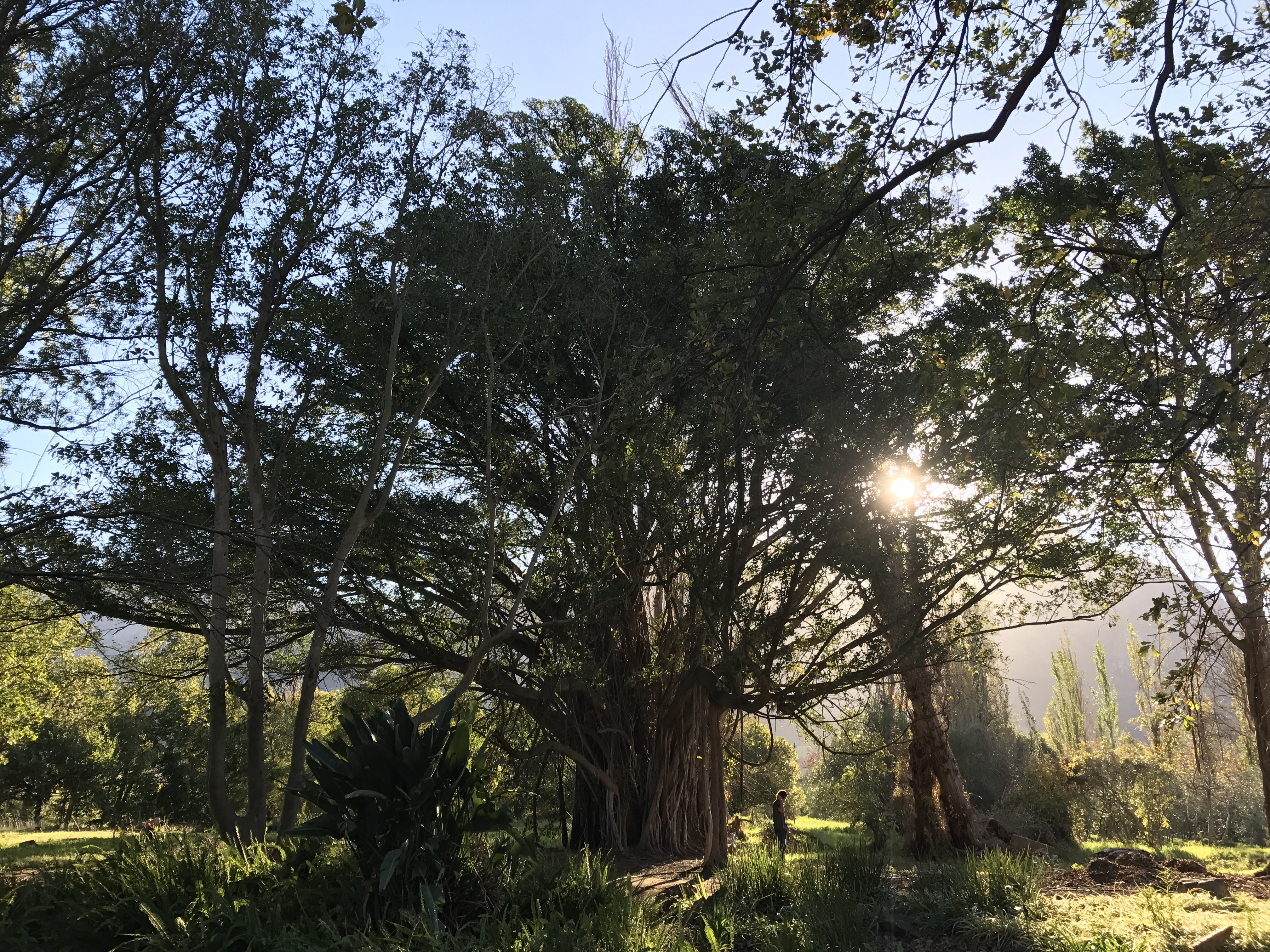 Volwasse wildevy met onder meer jong populiere in die agtergrond op die wynlandgoed Saronsberg in Tulbagh, Wes-Kaap.